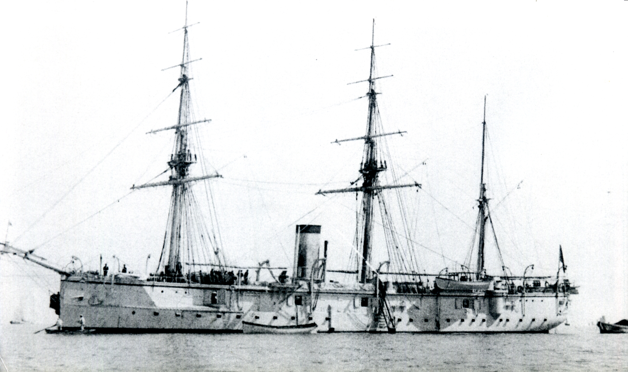 Japanese sloop-of-war Katsuragi at Kobe